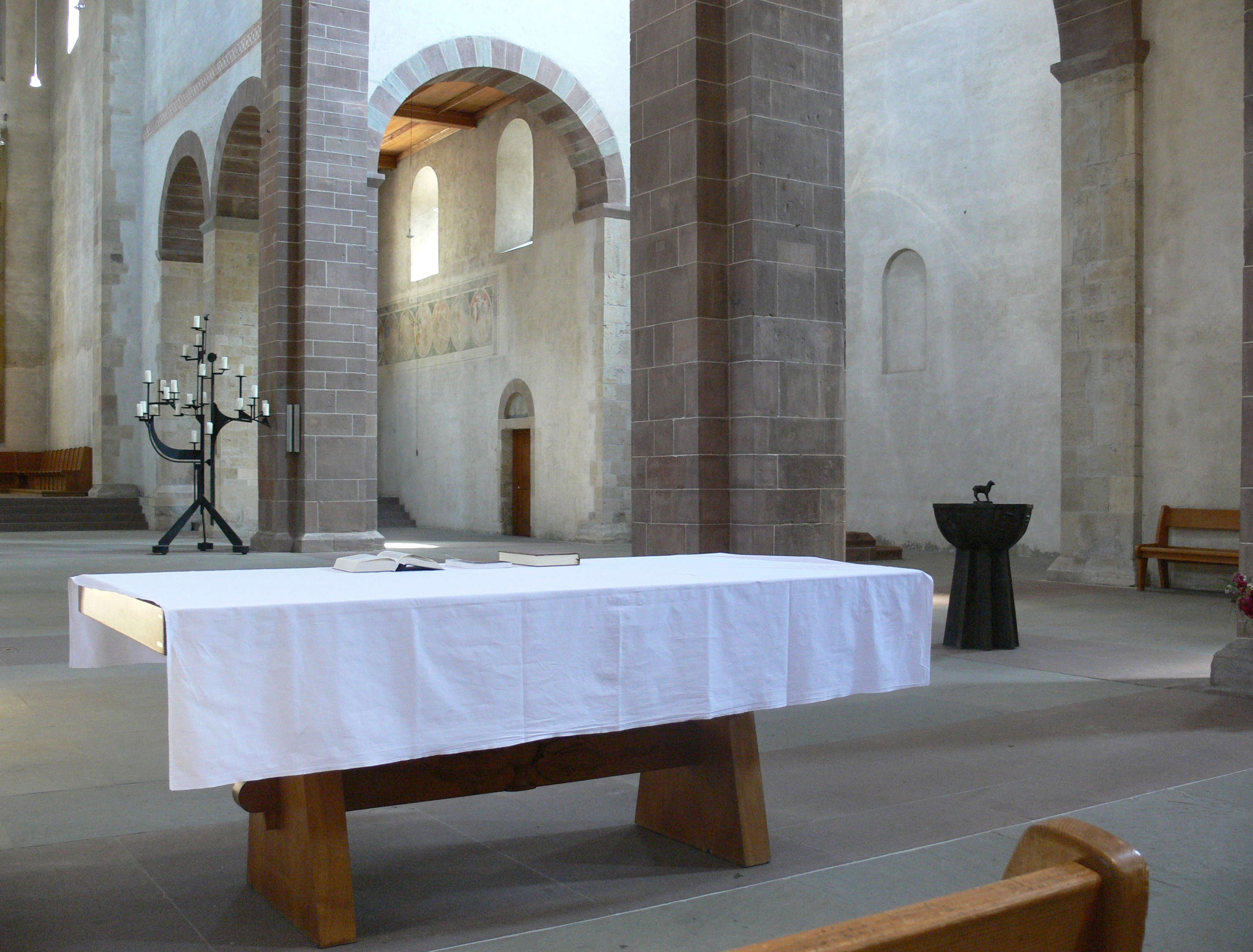 Schaffhausen, Münster, Abendmahlstisch